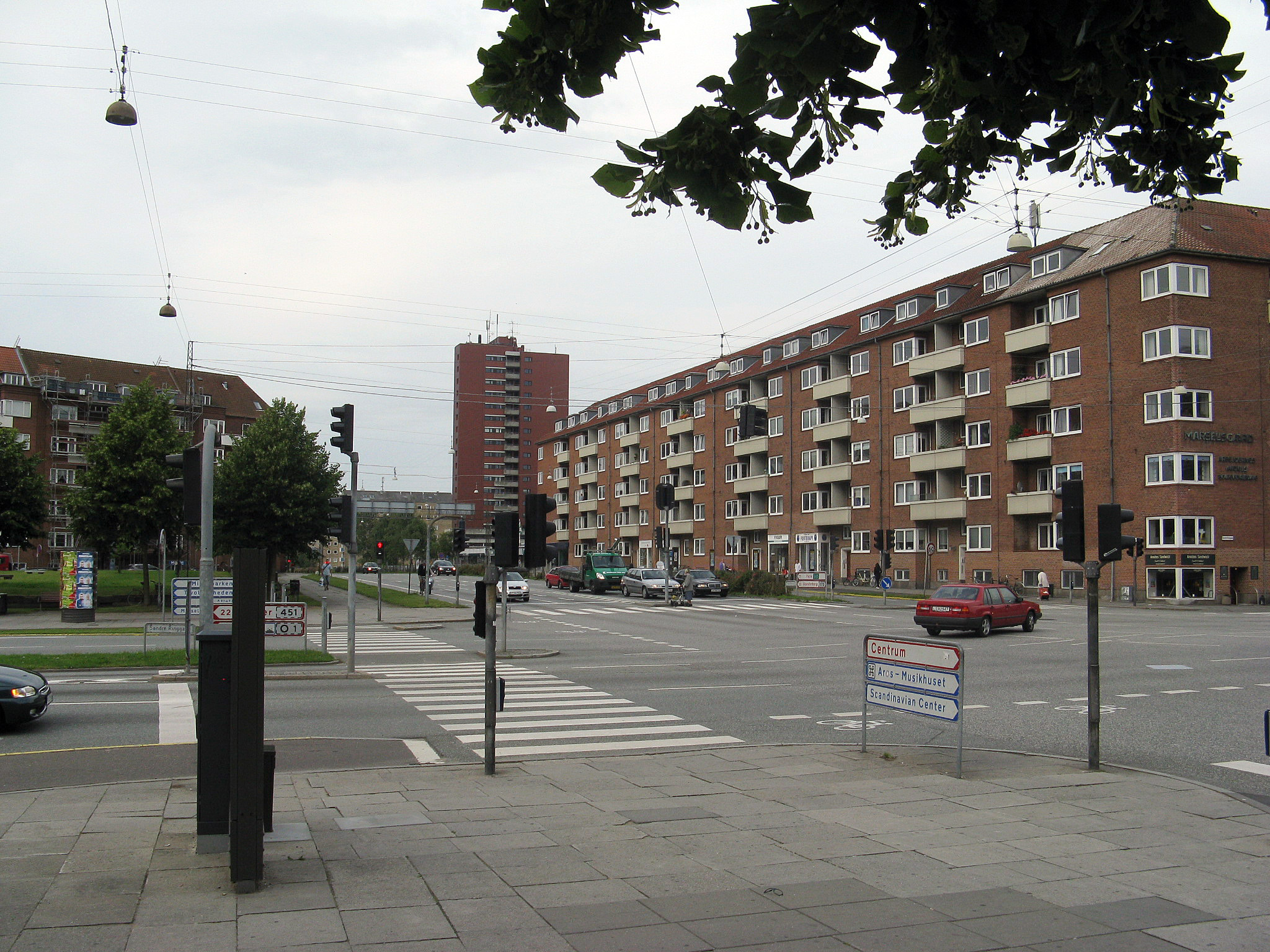 Harald Jensens Plads i Århus , Denmark